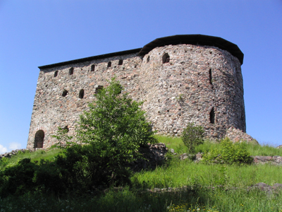 Ett foto av Raseborgs slottsruiner år 2004 tagen av Loskin ". Raseborg ligger i Snappertuna nära staden Ekenäs i Landskapet Nyland i syligaste Finland